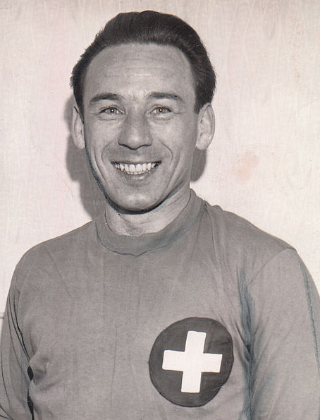 Karl-Heinz Wettig, ehemaliger deutscher Fußballspieler